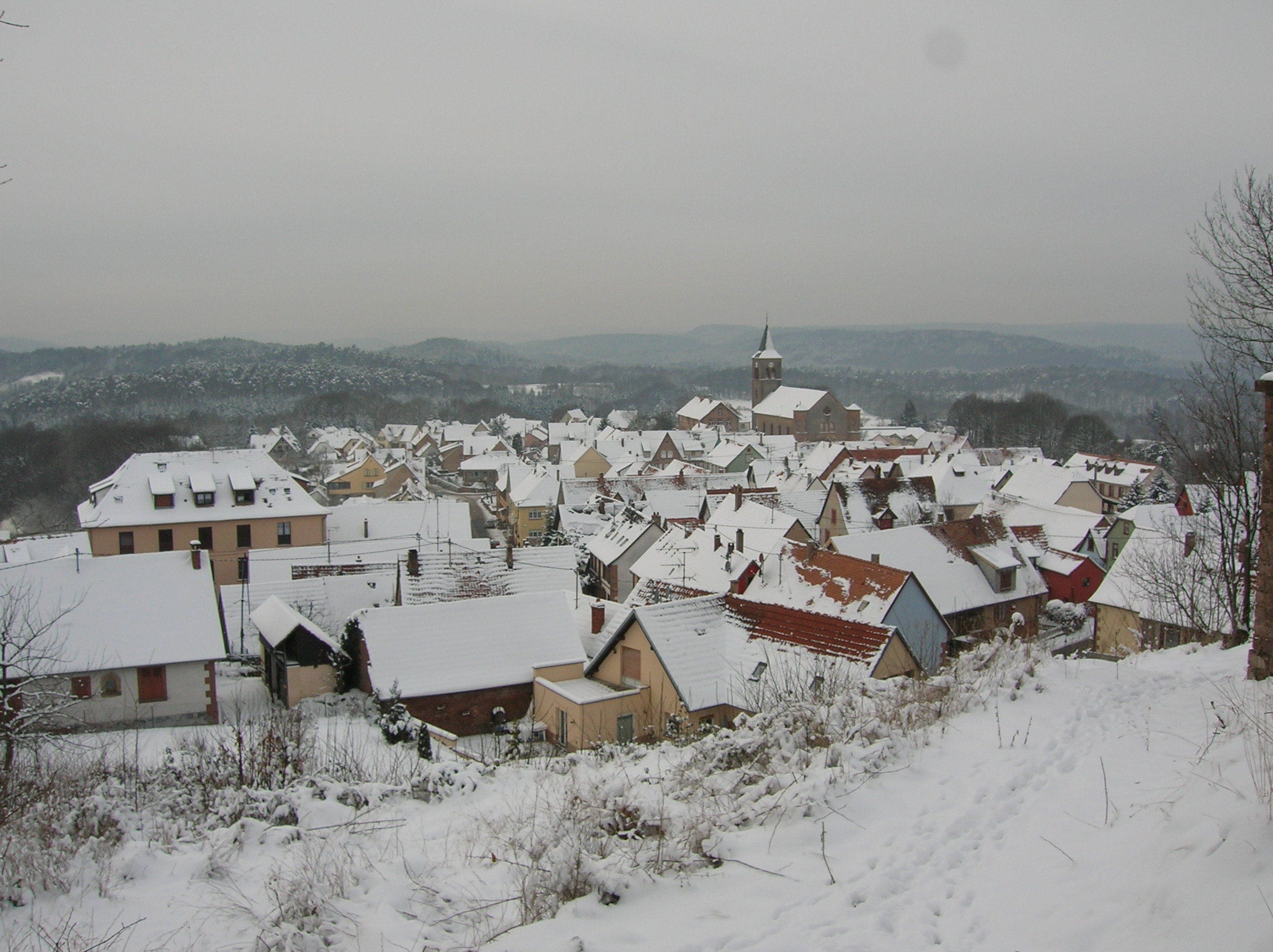 Lììschteburi, Unterelsàss